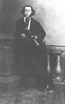 Австрийский врач-педиатр Макс Кассовитц